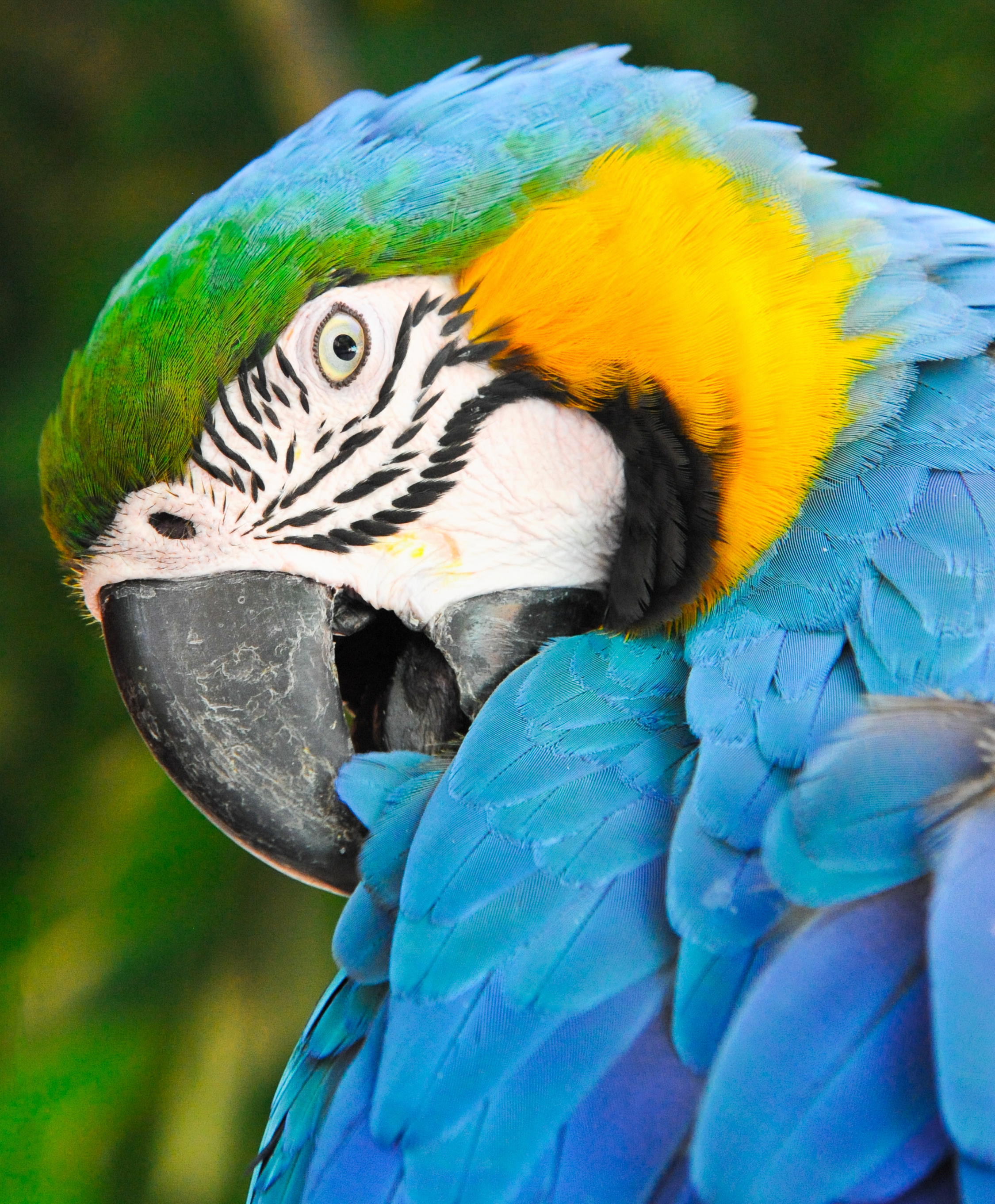 Arara Caninde - Mato Grosso do Sul